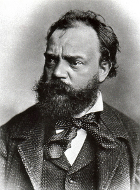 Antonín Dvořák (1841-1904)